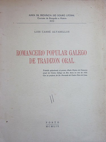 Romanceiro popular galego de tradizon oral